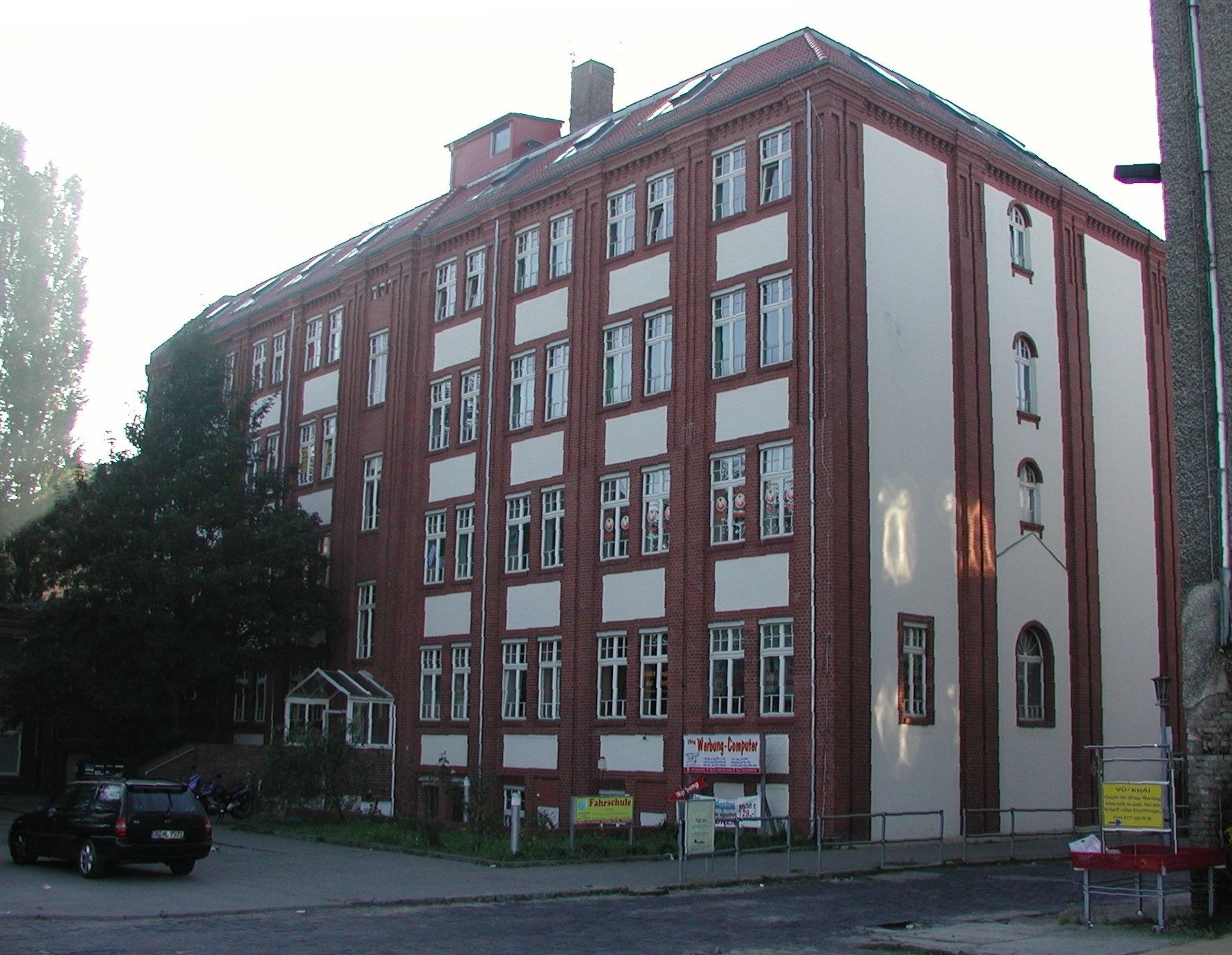 Gebäude des VEB Elektrokohle in der Herzbergstrasse